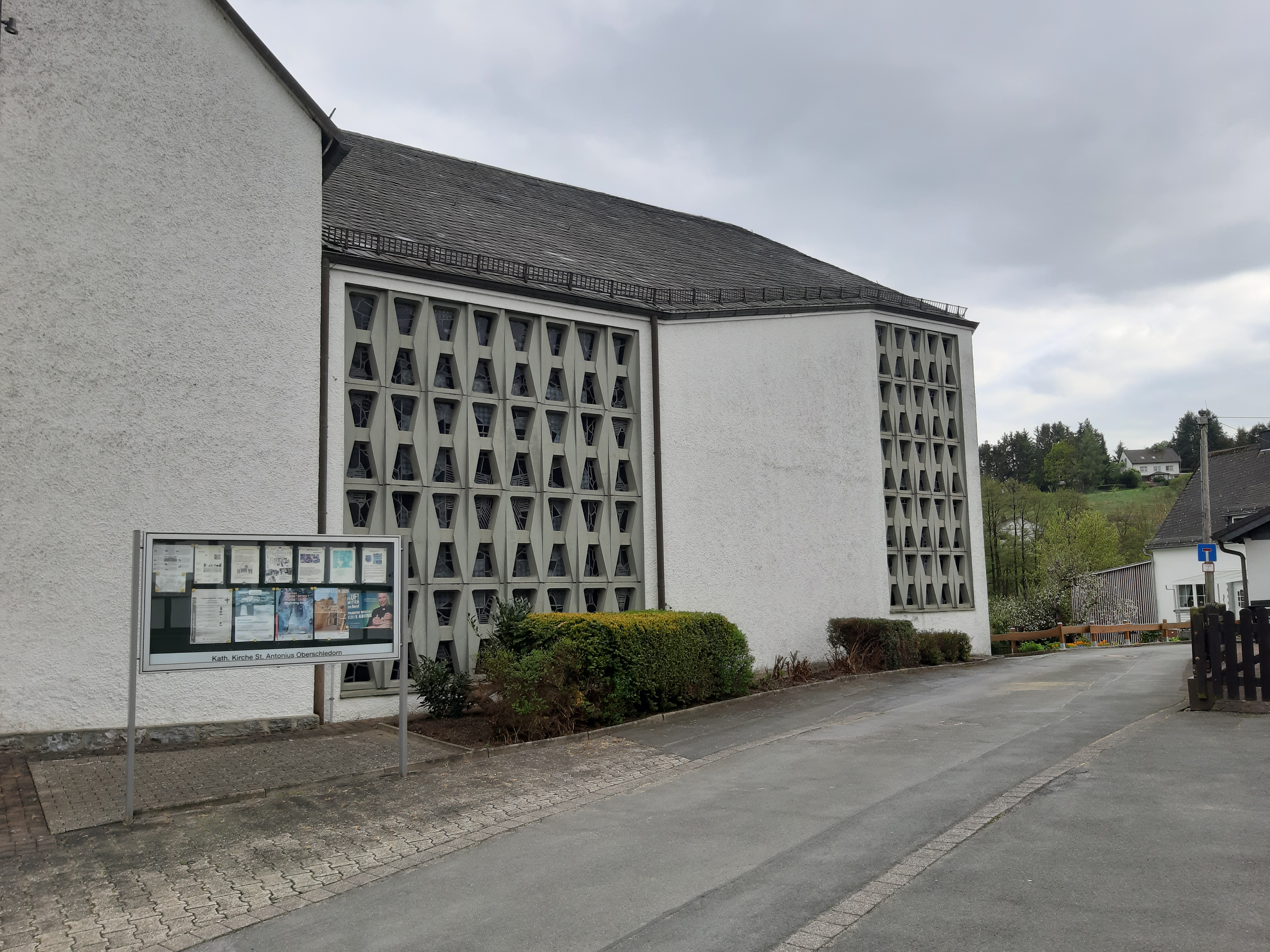 Blick auf den Anbau